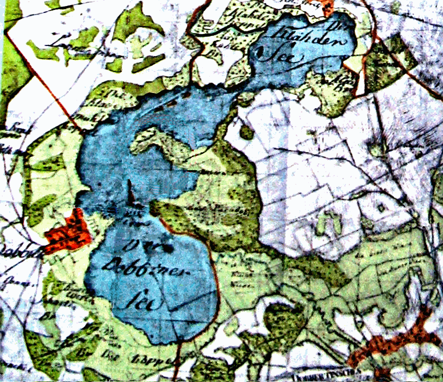 Ehemaliger See "Dobbiner See"